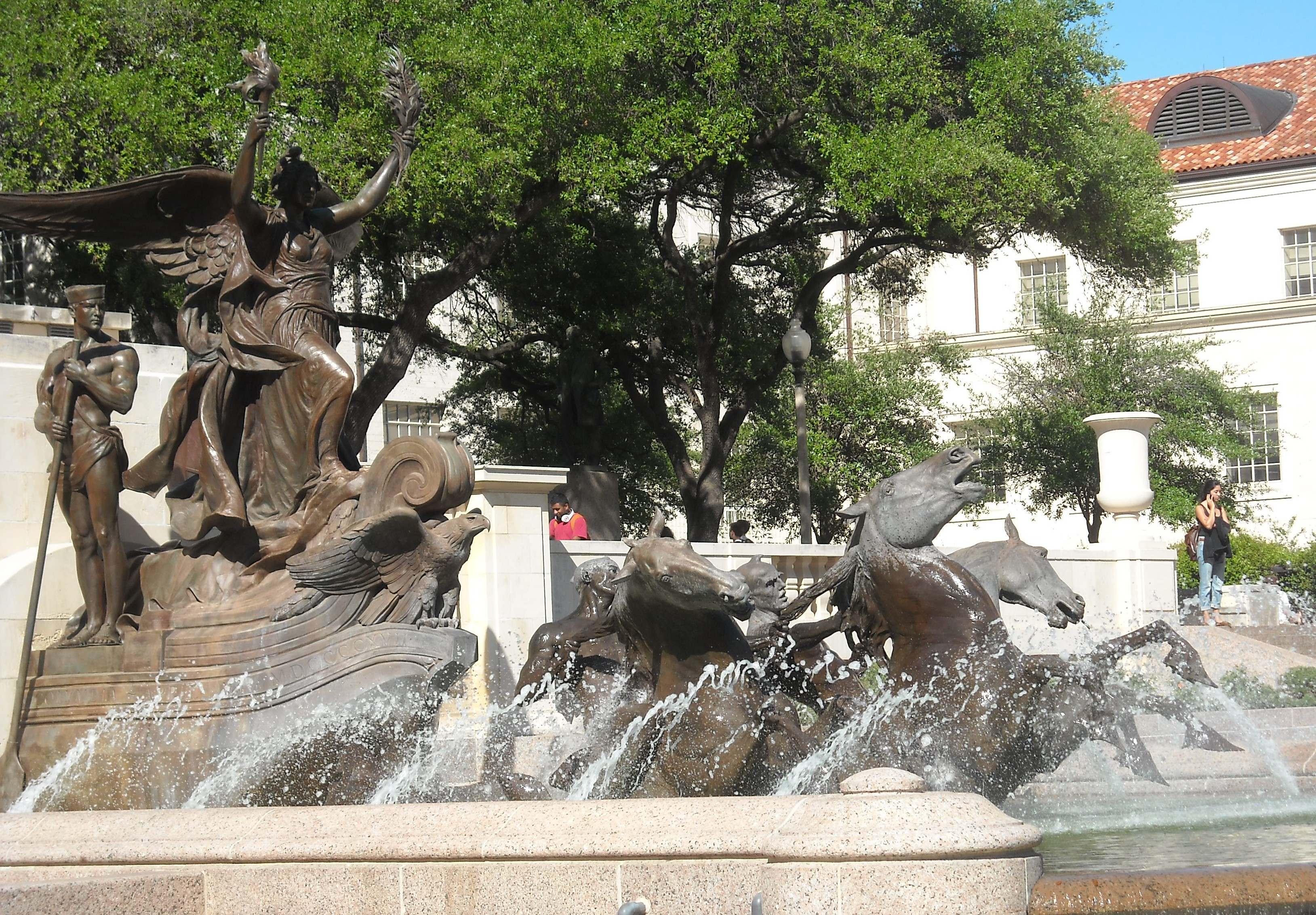 En af de mest populære springvand på UT campus er Littlefield Fountain.